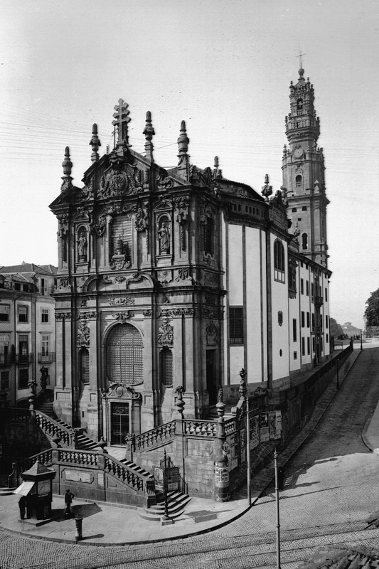 28a